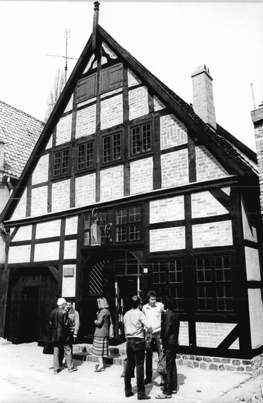 Güstrow, Kerting-Gedenkstätte ADN-ZB Pätzold-18.5.85 Bez. Schwerin: Eine Kerting-Gedenkstätte wurde im Geburtshaus des bedeutenden Malers in Güstrow der Öffentlichkeit übergeben. Zum 200. Geburtstag Georg Friedrich Kerstings (31.10.1785 - 1.7.1847), eines charakteristischen Vertreters des deutschen Biedermeiers, wird eine Memorial-Ausstellung gezeigt. Das Haus aus dem Jahre 1530 gehört zu den ältesten in der mecklenburgischen Kreisstadt. Es wurde von Denkmalpflegern weitgehend originalgetreu restauriert und gilt als aufschlußreiches Denkmal für Kultur und Lebensweise des Volkes im späten Mittelalter.